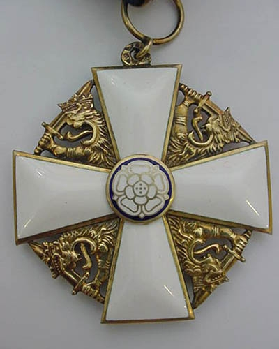 Order Białej Róży (fin.: Suomen Valkoisen Ruusun ritarikunta, szw.: Finska Vita Rosens orden) – obecnie, od czasu zaprzestania nadań Orderu Krzyża Wolności, w praktyce najwyższe odznaczenie Finlandii, przyznawane za zasługi wojskowe i cywilne od 16 maja 1919. Kolekcja Bo Radeborn, Malmö, foto: Alexvonf 2003